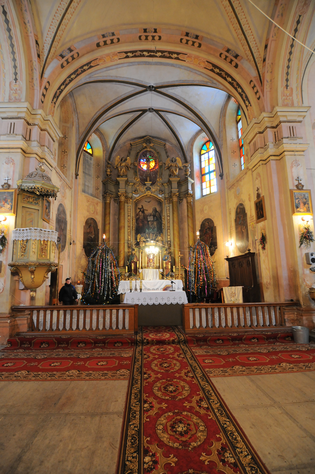 Поморяни інтер'єр костелу Пресвятої Трійці